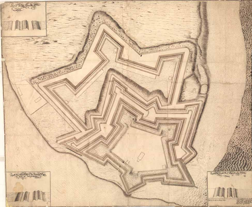 Daugavgrīvas cietokšņa plāns. 1642. gads. Autors Matiass Rihters (Matthias Richter). 1642. gads.